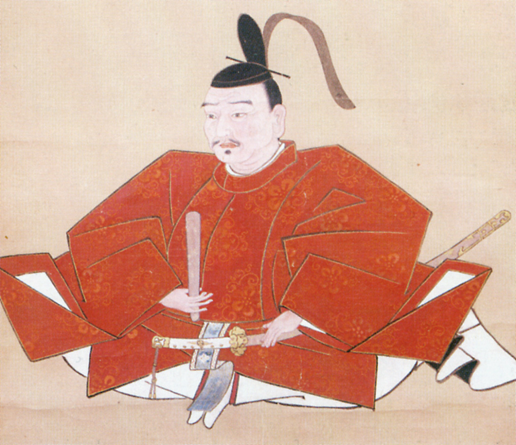 成瀬正成 Naruse Masanari.